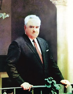 Juan José Torres Landa, Gobernador del Estado de Guanajuato en 1961. Centenario de su Natalicio